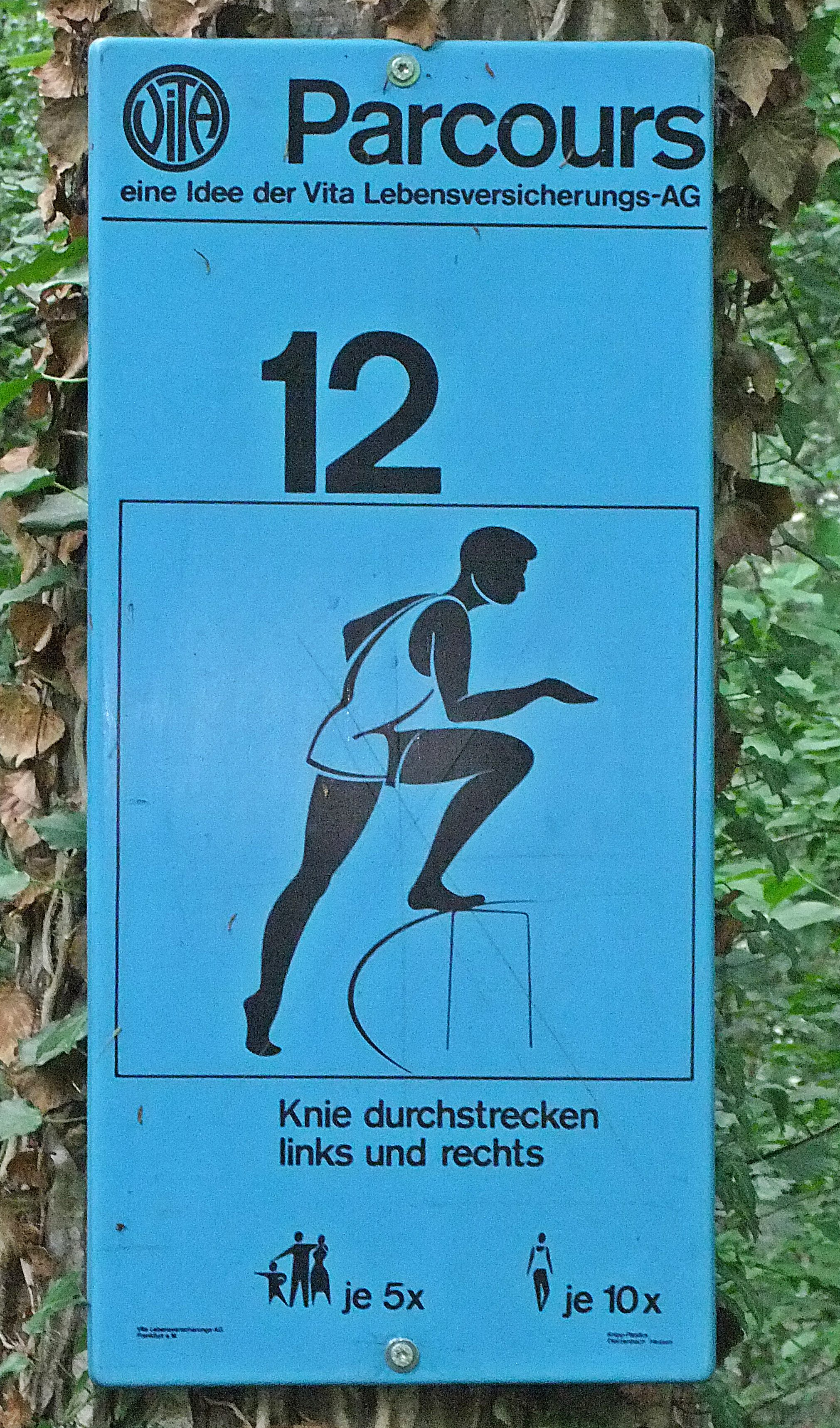 Trimm-Dich-Pfad, Beispiel für eine Station in Östringen